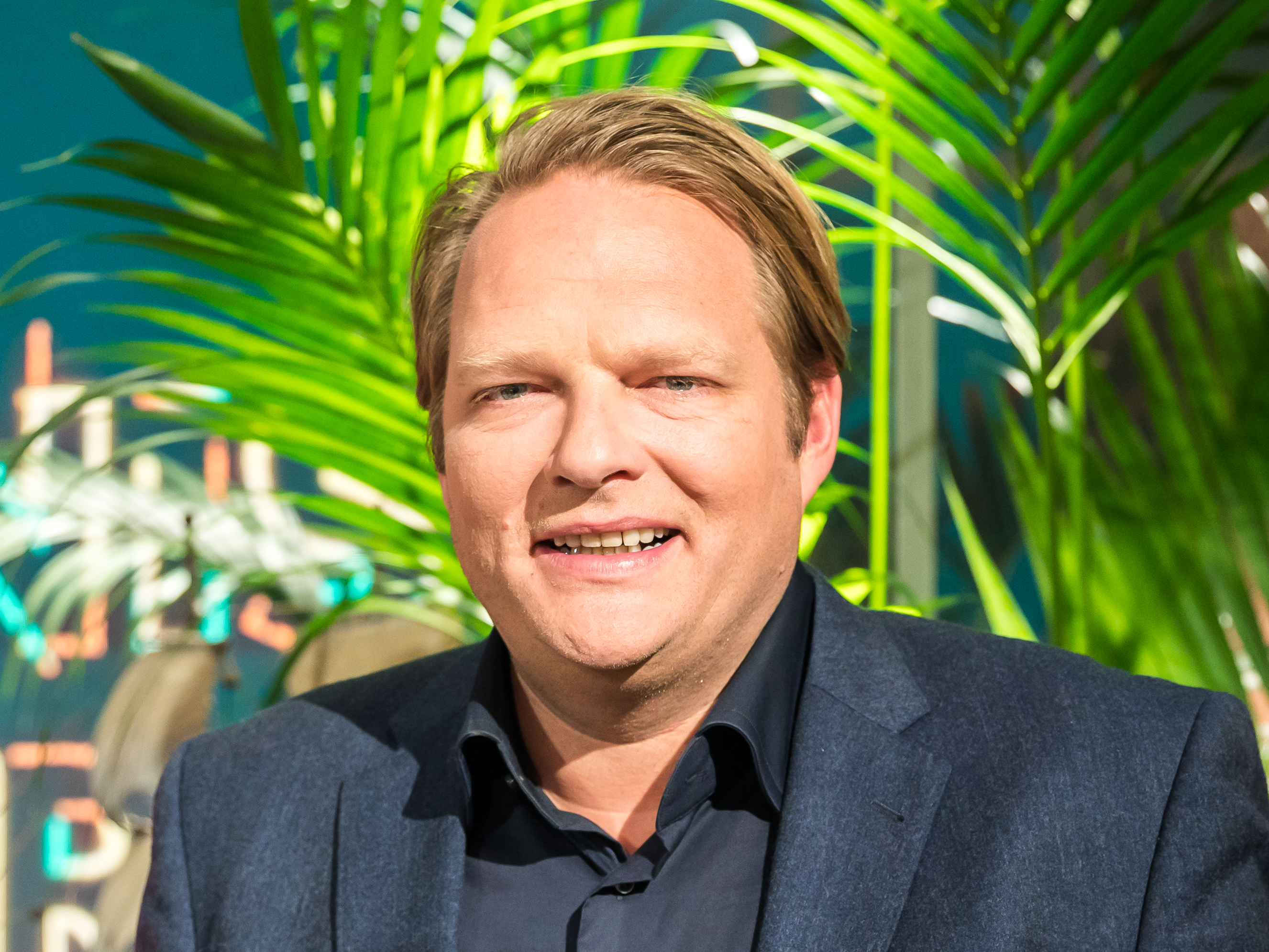 „Geheimniskrämer“ mit Martin Klempnow und seinen Gästen. Aufzeichnung des Westdeutschen Rundfunks im Studio Köln-Bocklemünd vom 23. Januar 2018 Foto: Björn Freitag